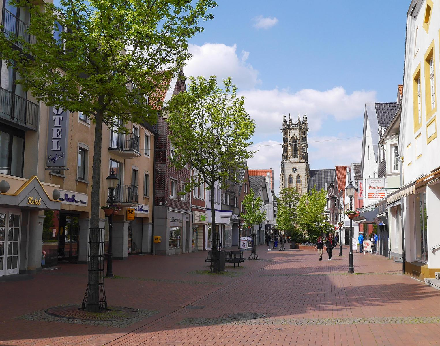 Lange Straße in Richtung St.-Johannes-Kirche in Oelde